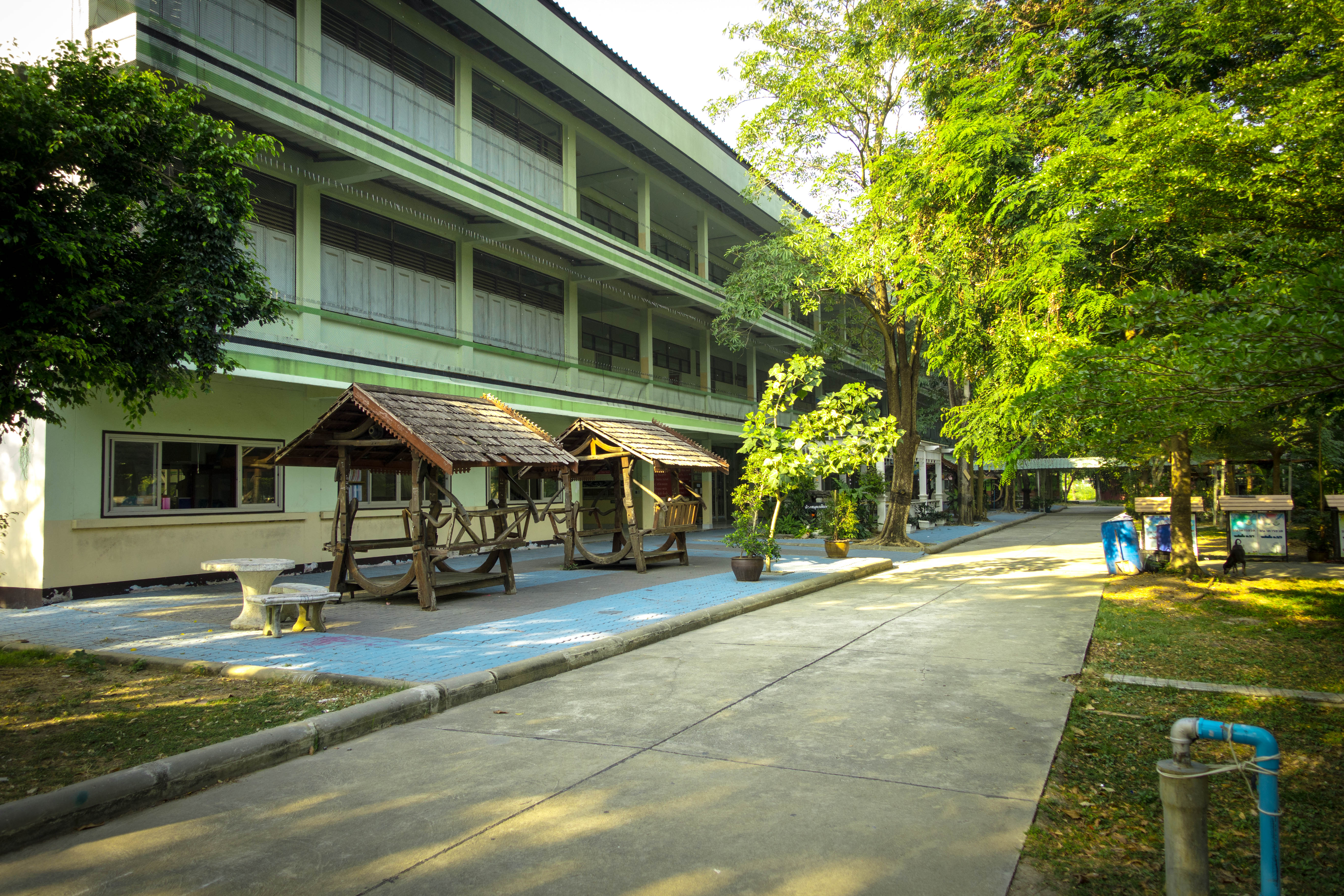 อาคารเรียน2รย.